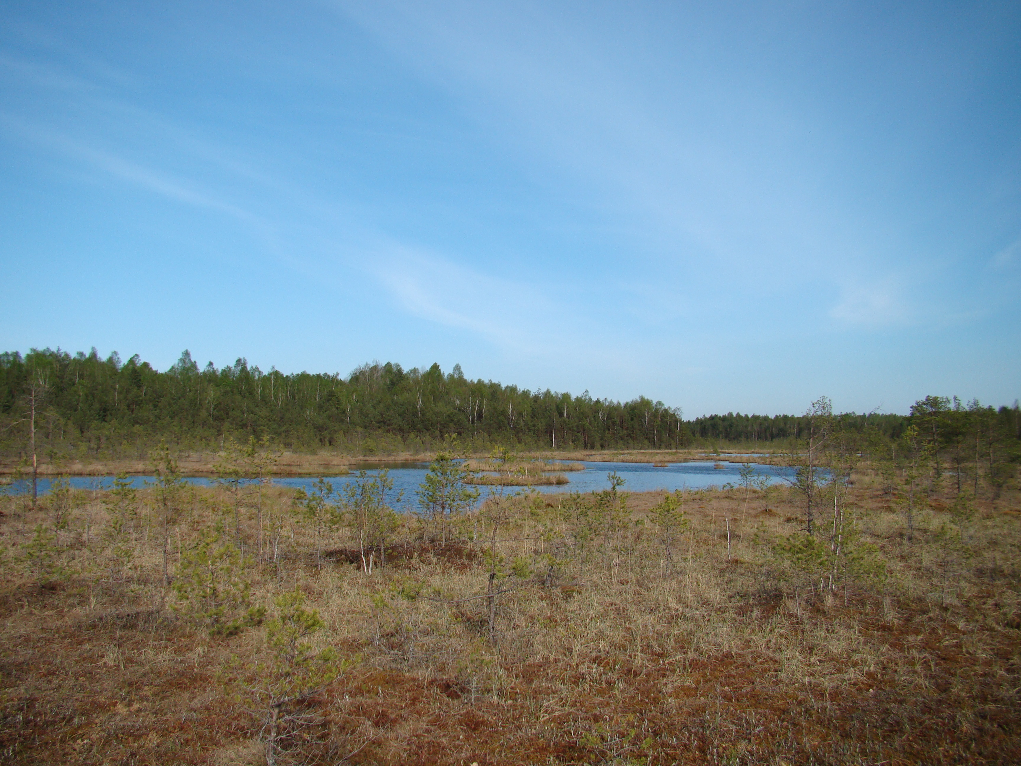 Varnikų botaninio-zoologinio draustinio pažintinis takas